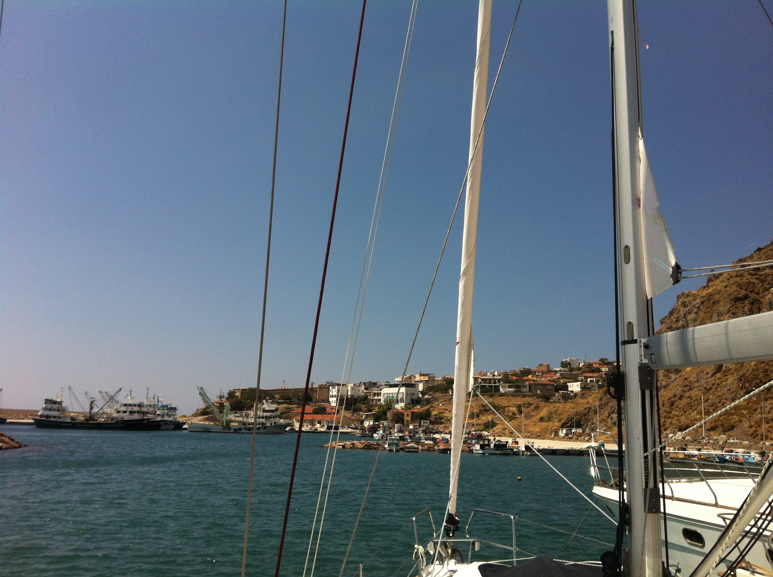 Babakale Balıkçı Barınağı